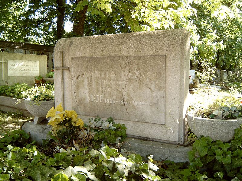 Lavotta Rezső (Rudolf) (Bp., 1876. máj. 1. – Bp., 1962.): karmester, zeneszerző sírja Budapesten. Új köztemető: 15/1-1-1/2.